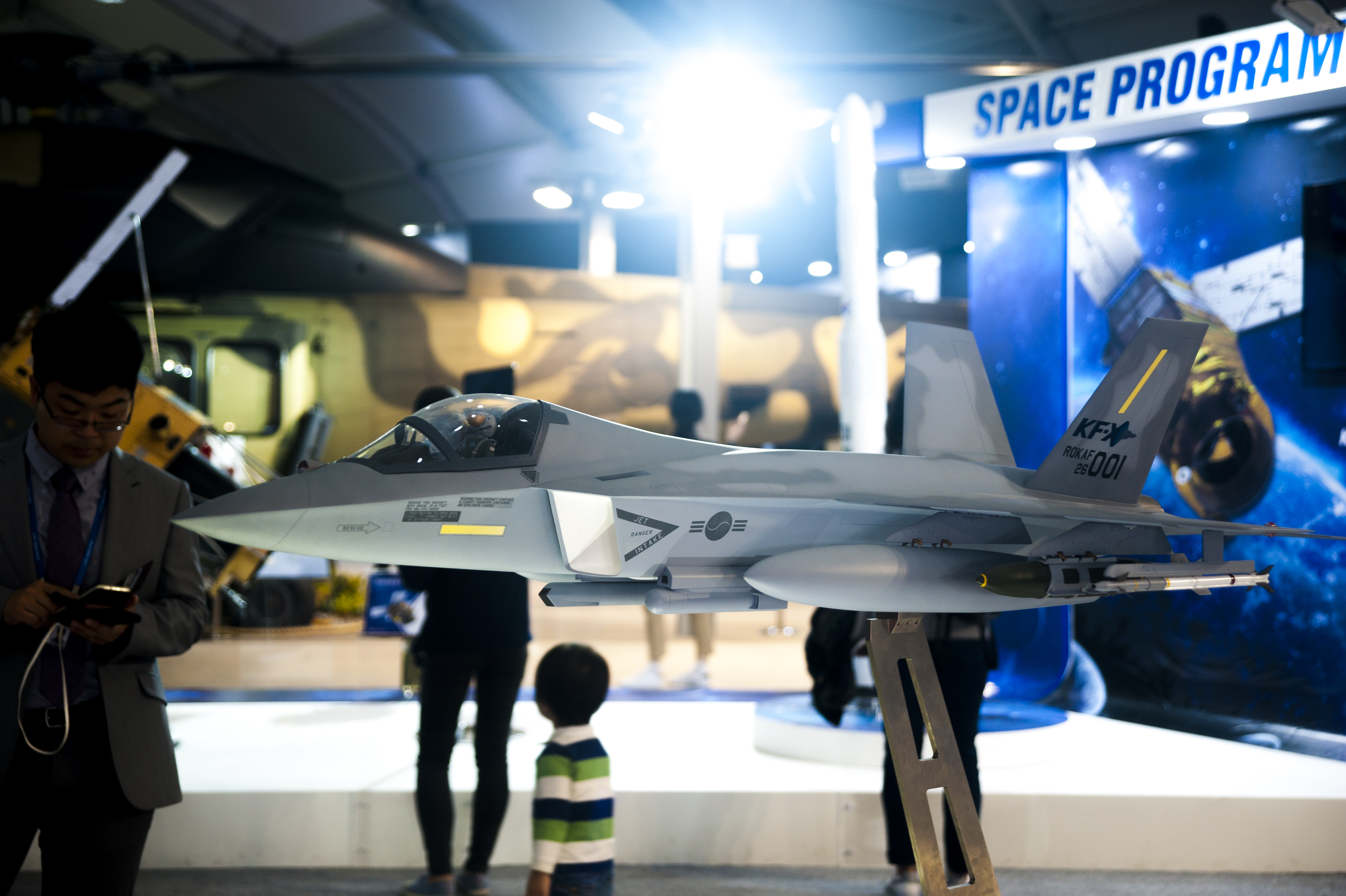 2017 서울 ADEX에서 공개된 KFX의 모형